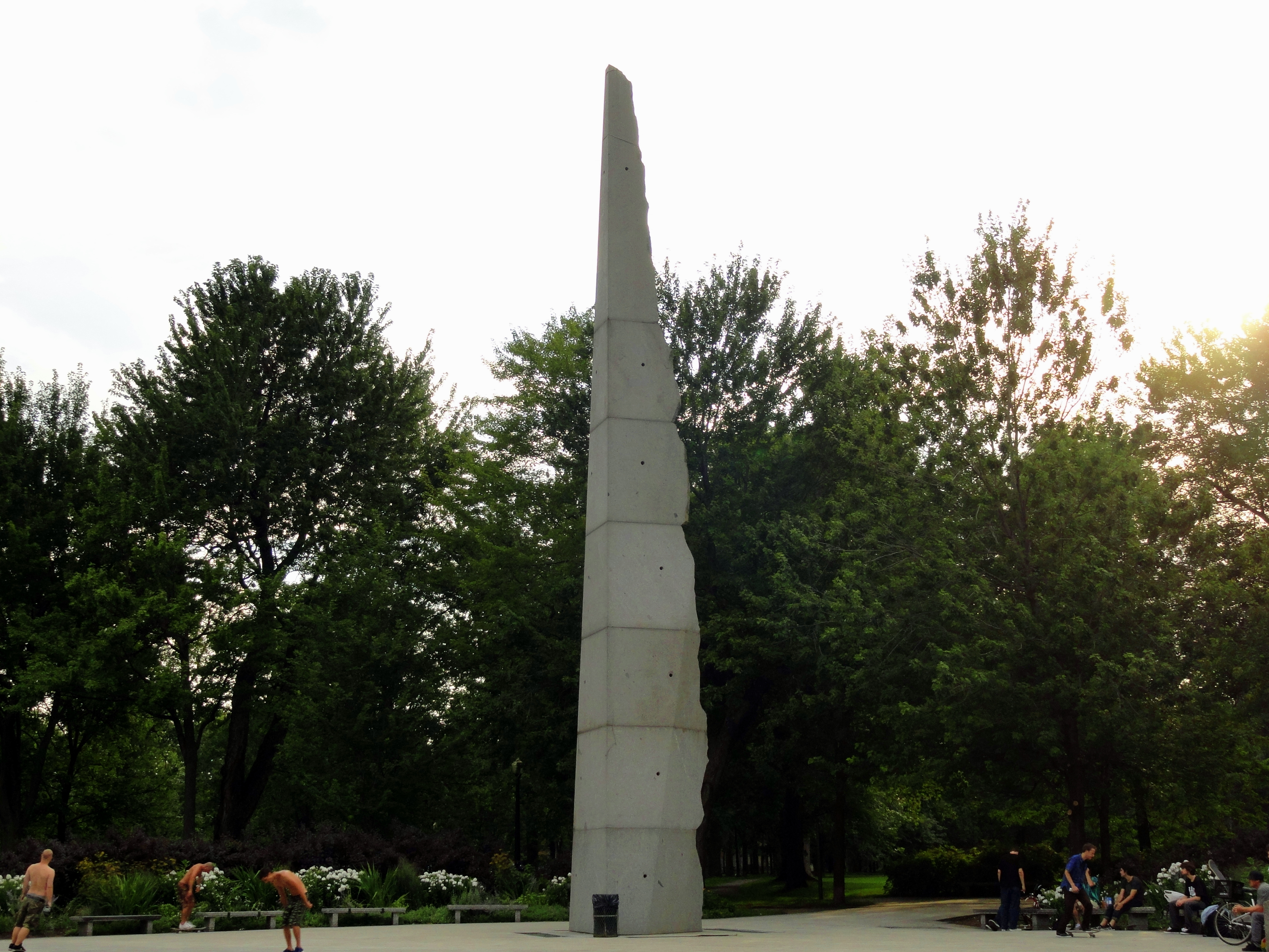 Parc Lafontaine, Montréal